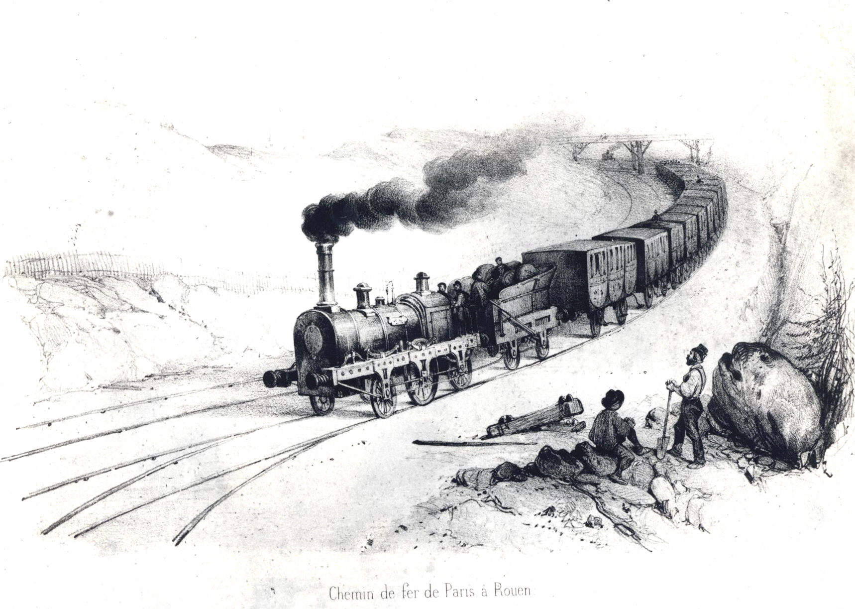 Train de voyageurs du chemin de fer de Paris à Rouen. Gravure sur bois, 30x40 cm.